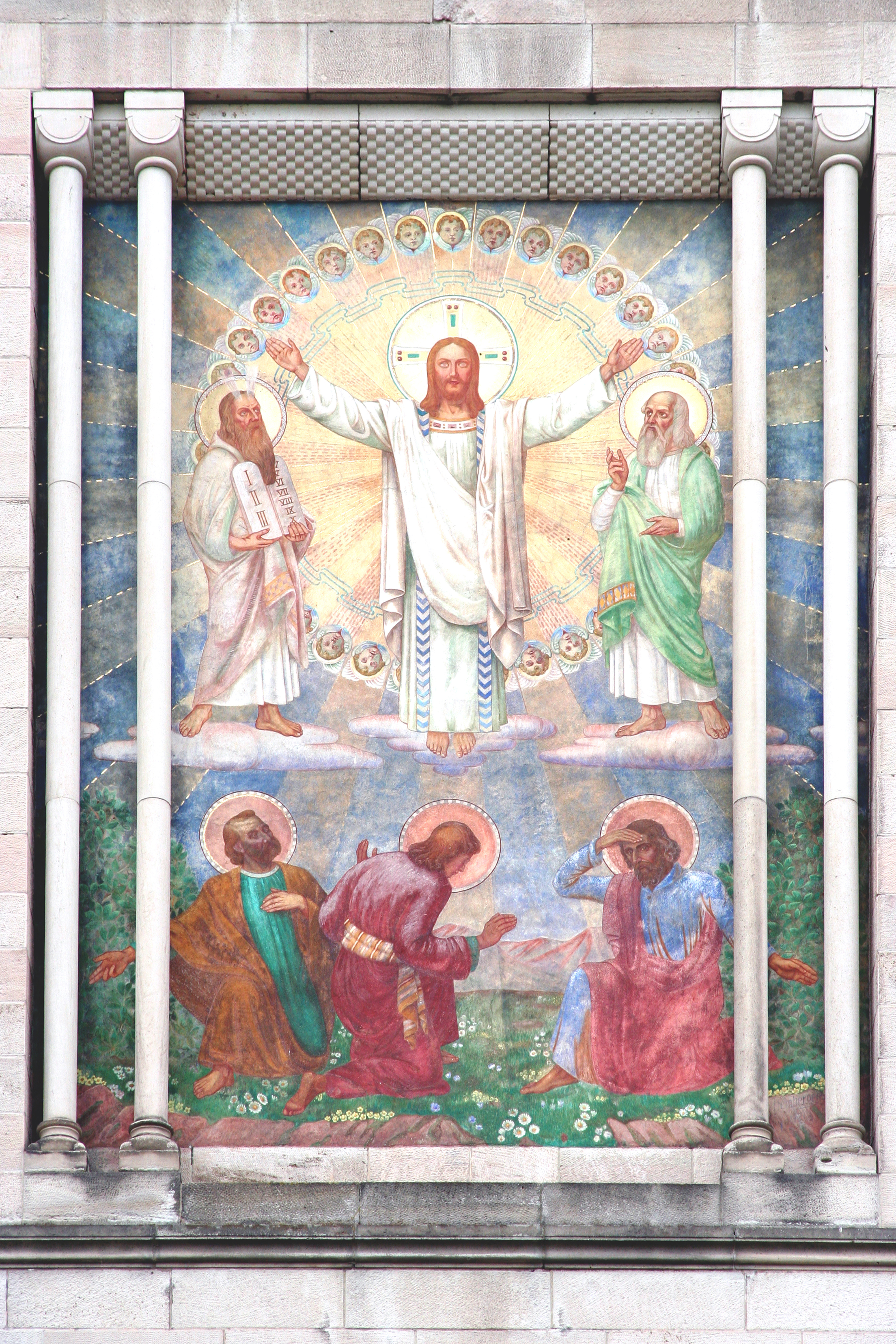 Römisch-katholische Pfarrkirche Herz-Jesu Obertsrot in Gernsbach